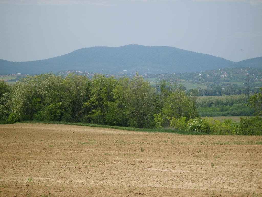 A Keleti-Mecsekben található Hármashegy. A magyar címeren is megtalálhatóak a kontúrjai.